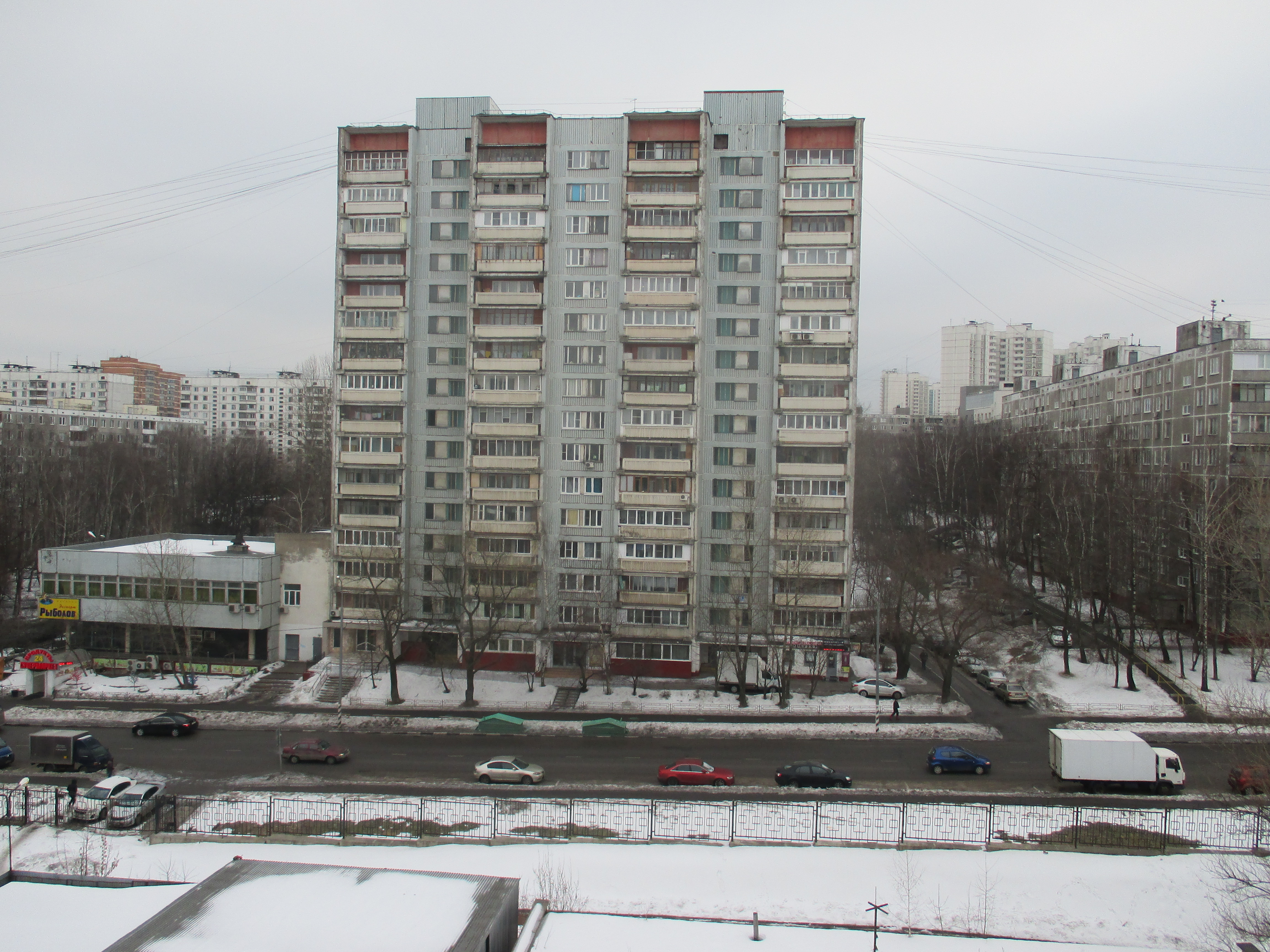 г Москва, дом на улице Академика Волгина, 5/3. Шестнадцатиэтажный двухподъездный блочный жилой дом серии И-522А, 1980 г.